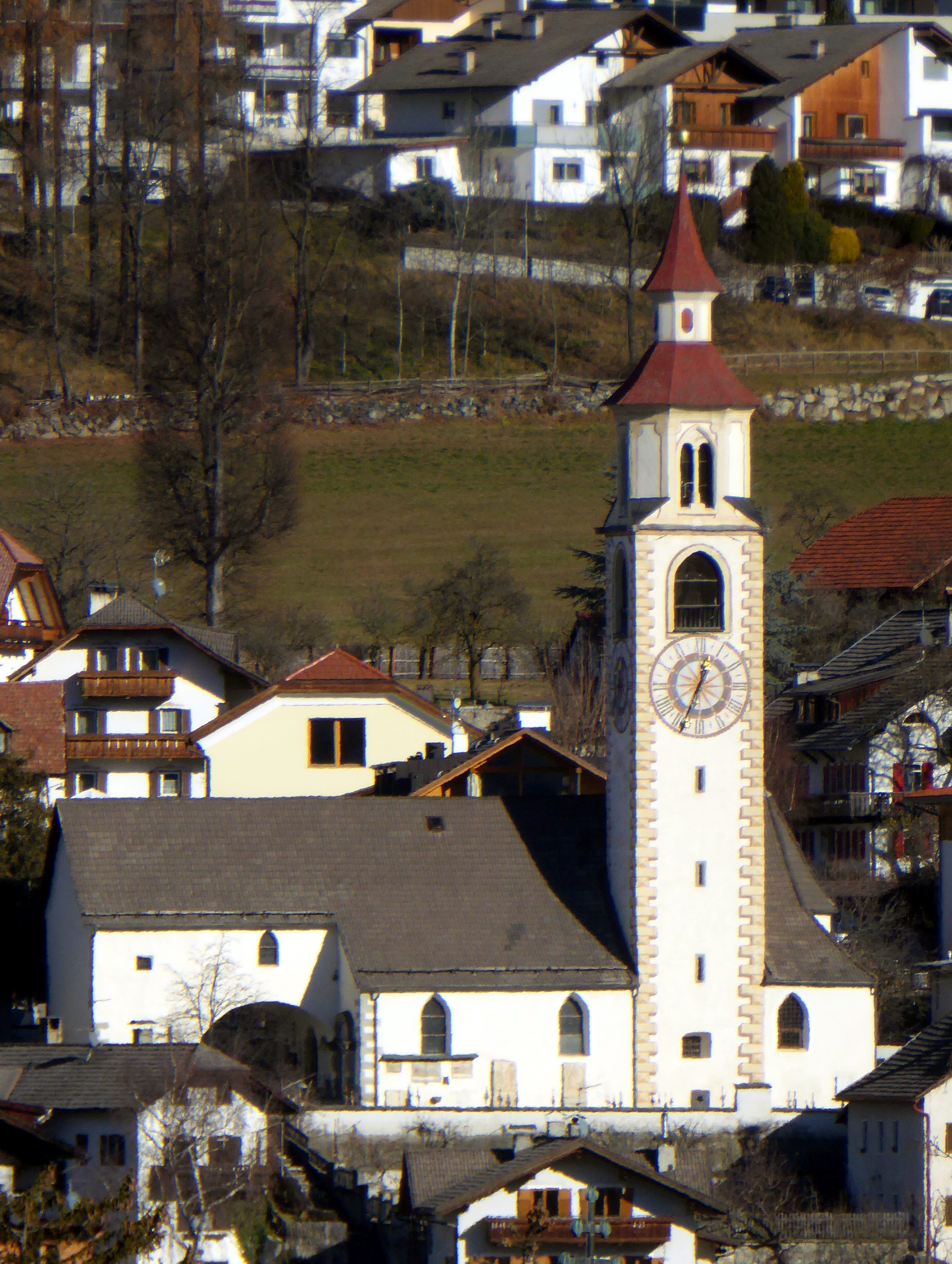 Dietenheim (Bruneck, Südtirol), Jakobskirche von Südwesten.